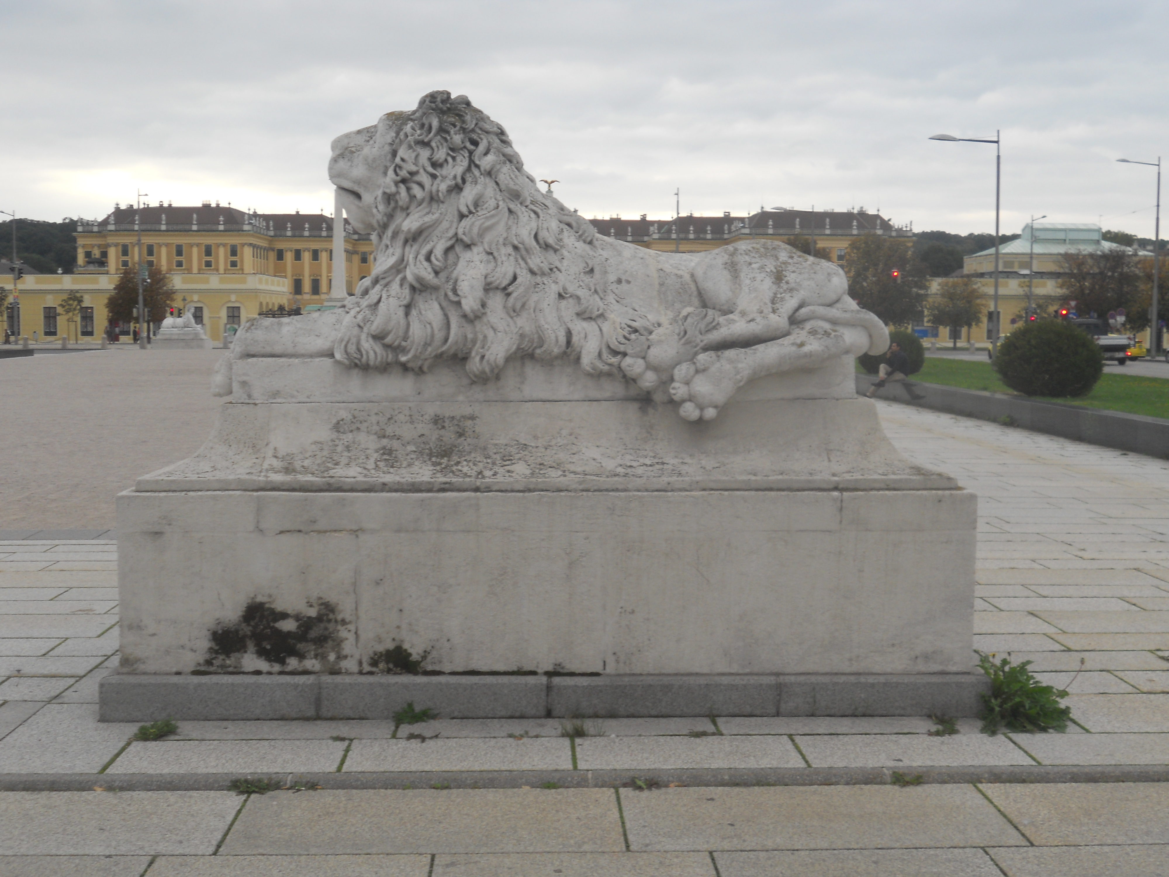 Rechter Löwe auf der Schönbrunner Schlossbrücke